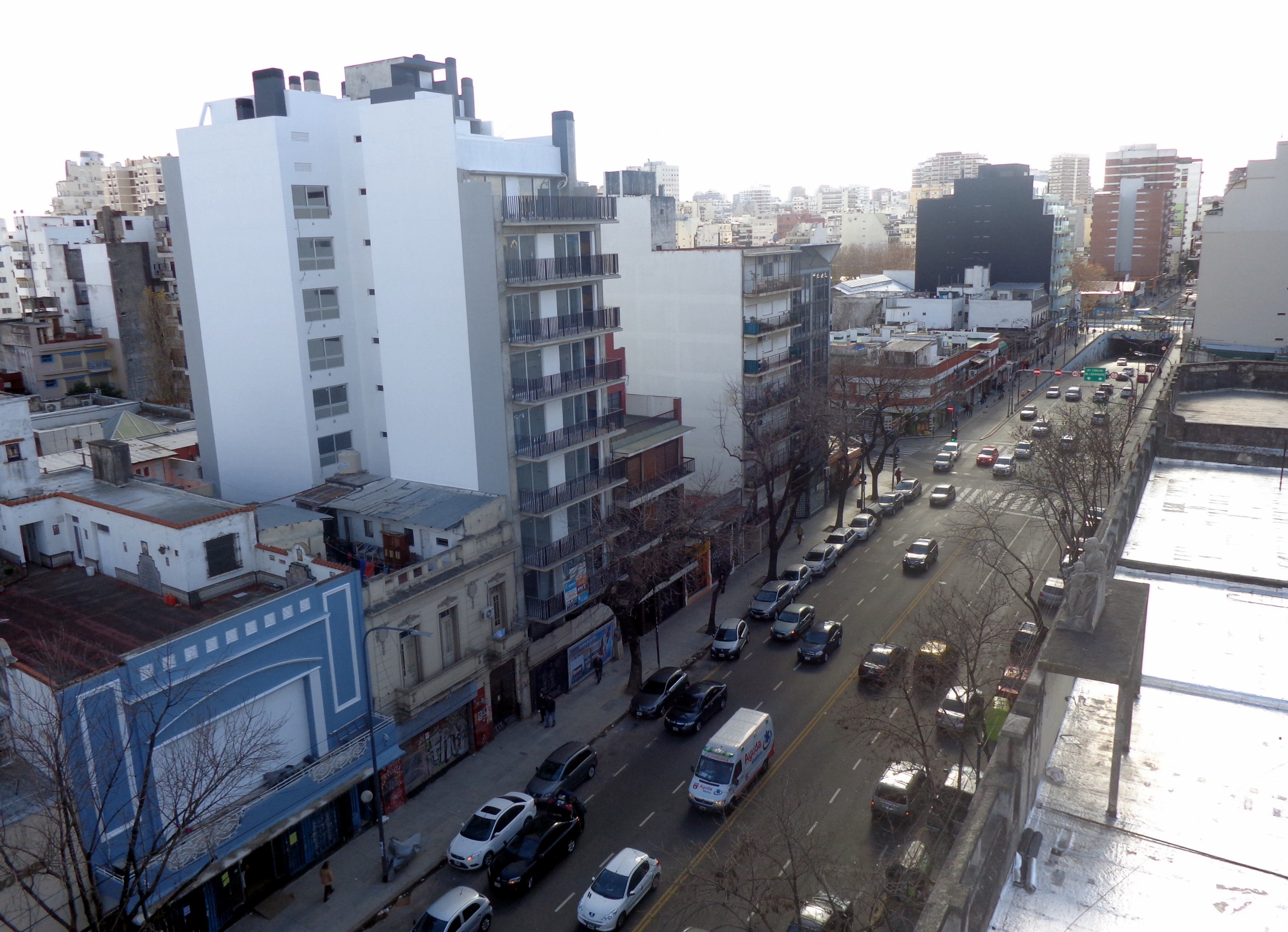 Avenida Federico Lacroze y túnel por debajo de las vías del ferrocarril Mitre, en el Barrio de Colegiales, Buenos Aires. Tomada de SO a NE (a la derecha se observa el ex Patronato Español)